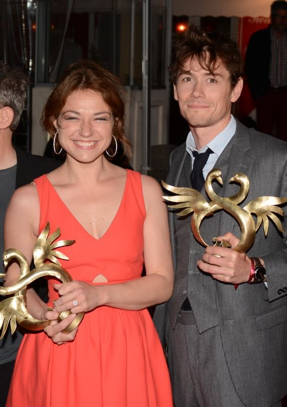 Emilie Dequenne et Loïc Corbery au festival du film de Cabourg